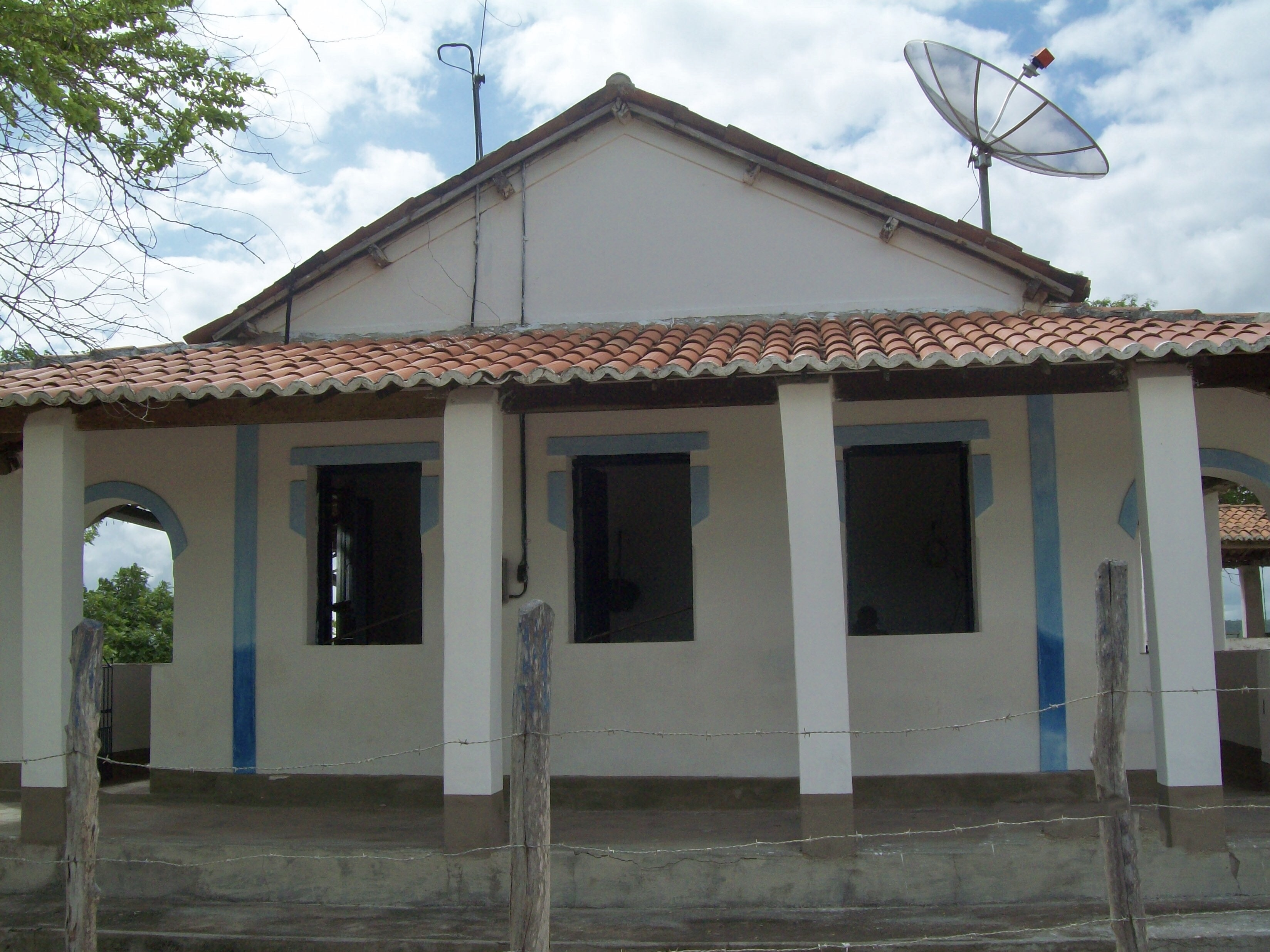 Itapiuna CE Brasil - Casa de Fazenda Típica do Sertão - Carrapateiras